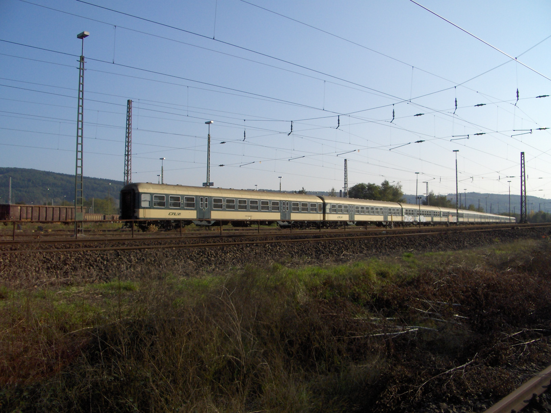 Ausrangierte Wegmann-Nahverkehrswagen (Typ "Silberling" der DB) der luxemburgischen Bahngesellschaft Chemins de Fer Luxembourgoise (CFL) im Rangierbahnhof Trier-Ehrang am 12. Oktober 2005.